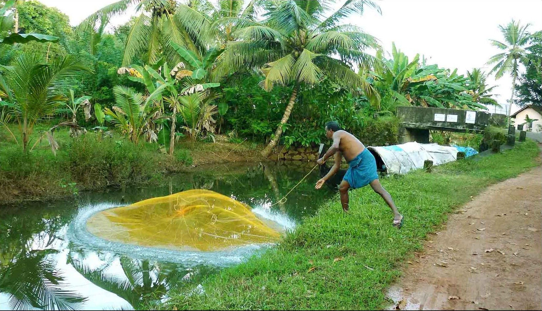 ചെറു മത്സ്യങ്ങളെ പിടിക്കാൻ ഉപയോഗിക്കുന്ന വലയാണ് വീശു വല എന്ന് പറയപ്പെടുന്നത്‌ . ചെറിയ കണ്ണികൾ ഉള്ള വല മുതൽ വീശു വലകൾ ലഭ്യമാണ് .